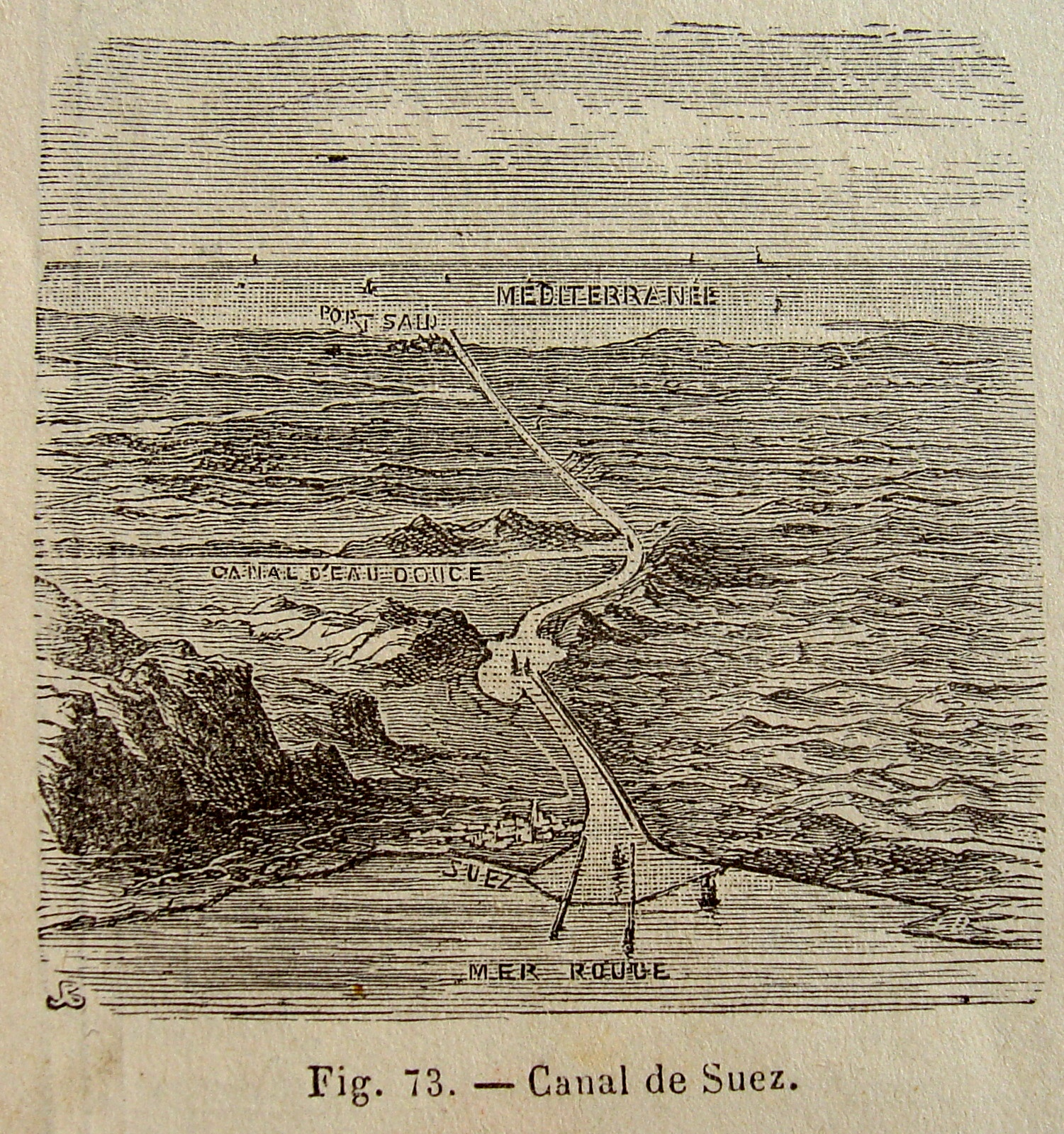 Canal de Suez